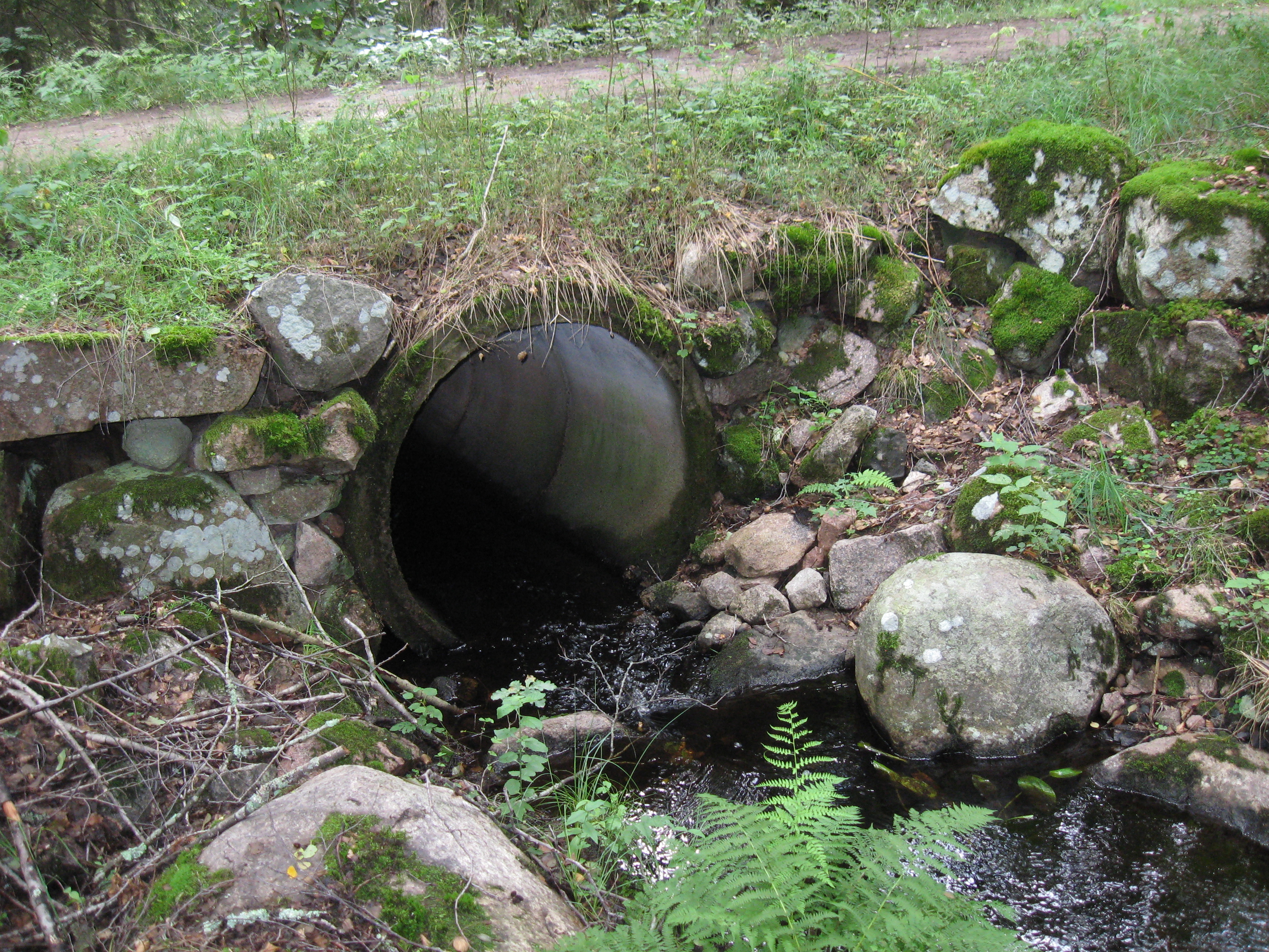 Snärjebäcken vid Tokebro